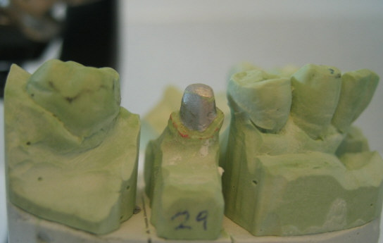 dental imprint